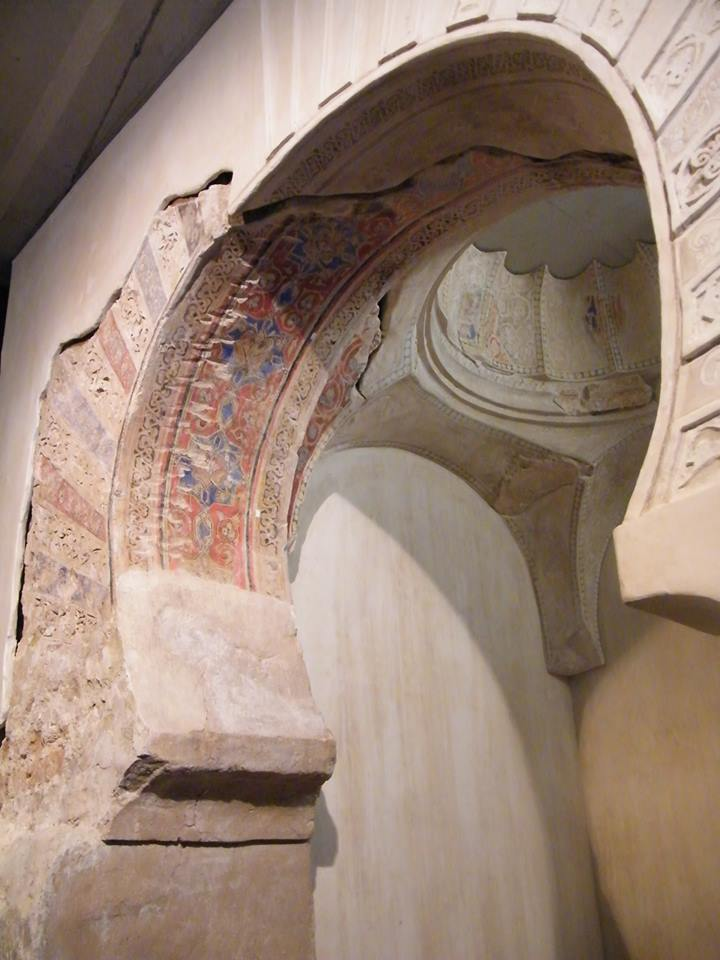 Detalle del Mihrab del siglo XII del Oratorio del Alcázar Nasir de Murcia (Región de Murcia, España).